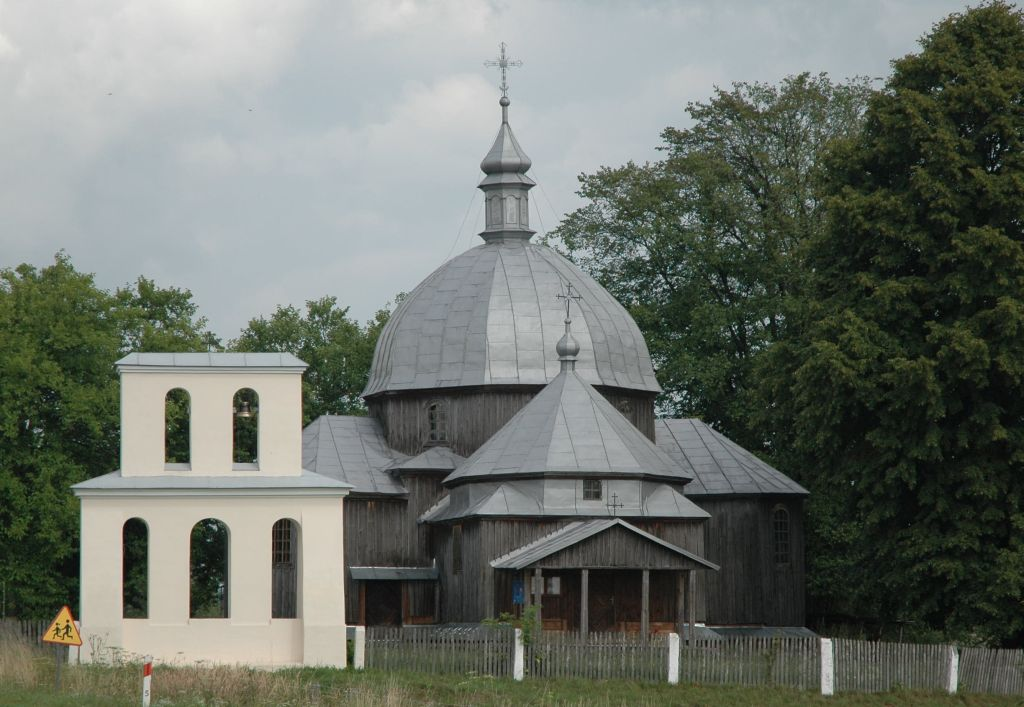 Poland, Kowalówka - wooden church.